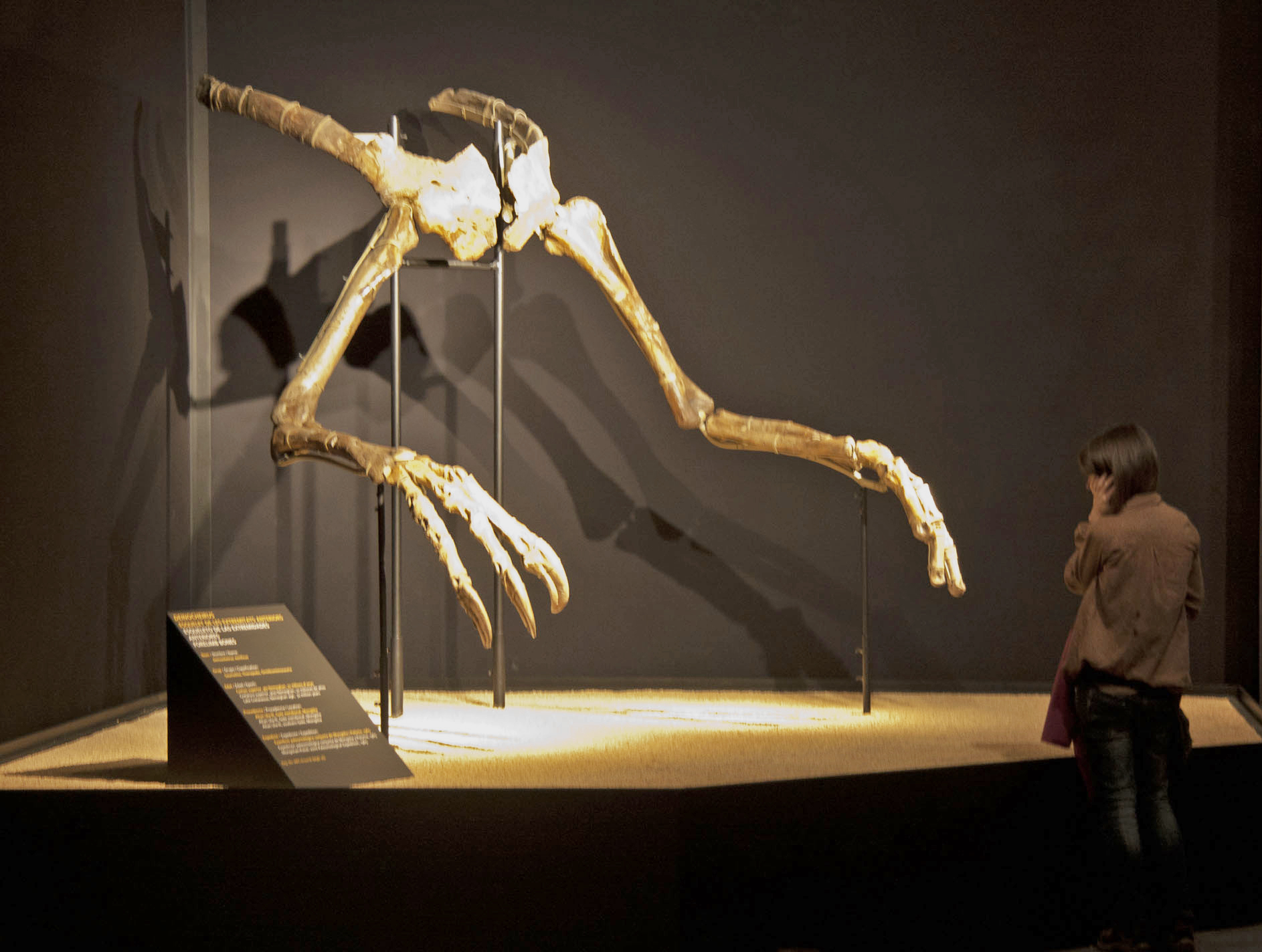 IMG_1241'